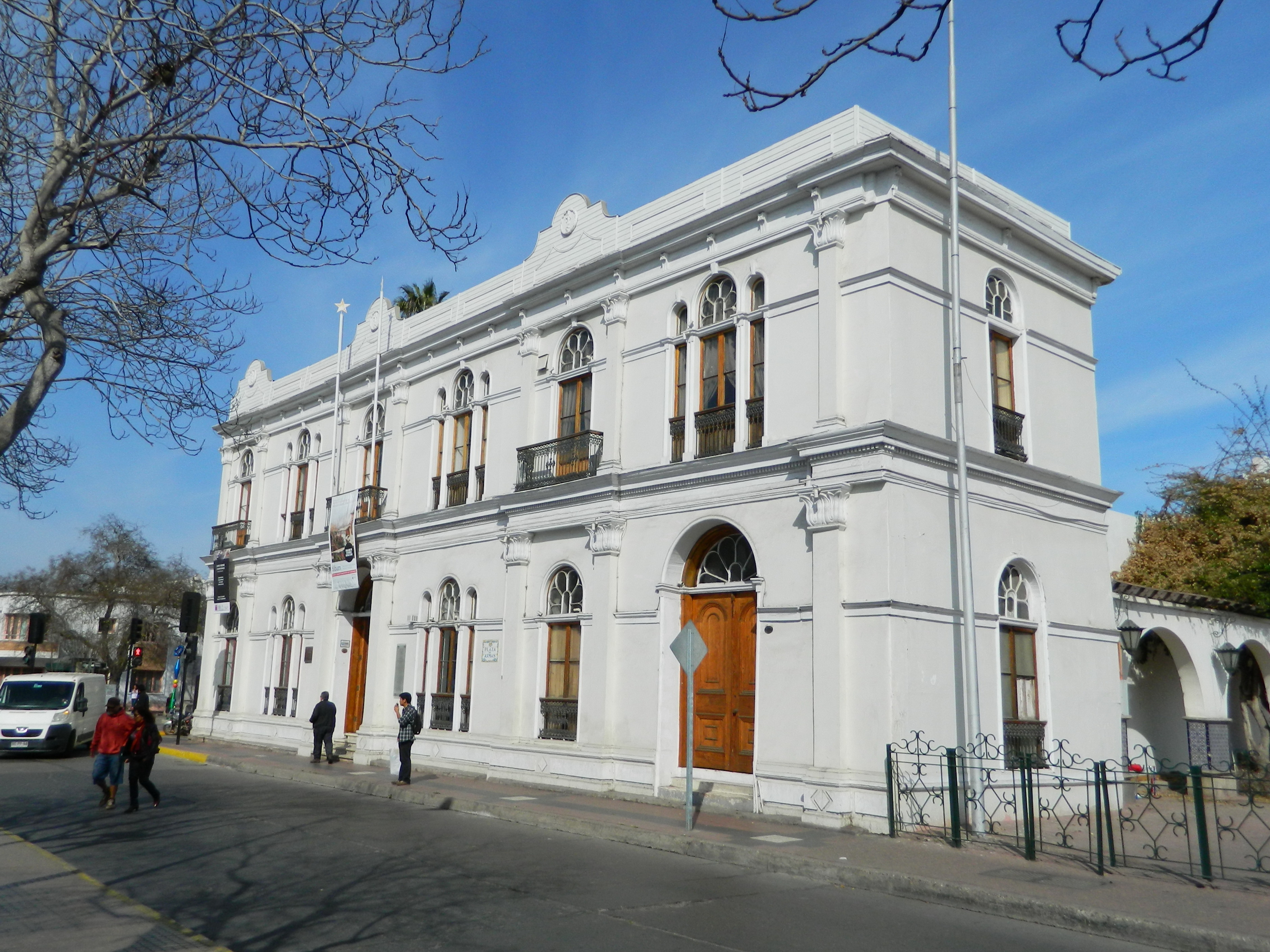 Casa González Videla This is a photo of a national monument in Chile: 597